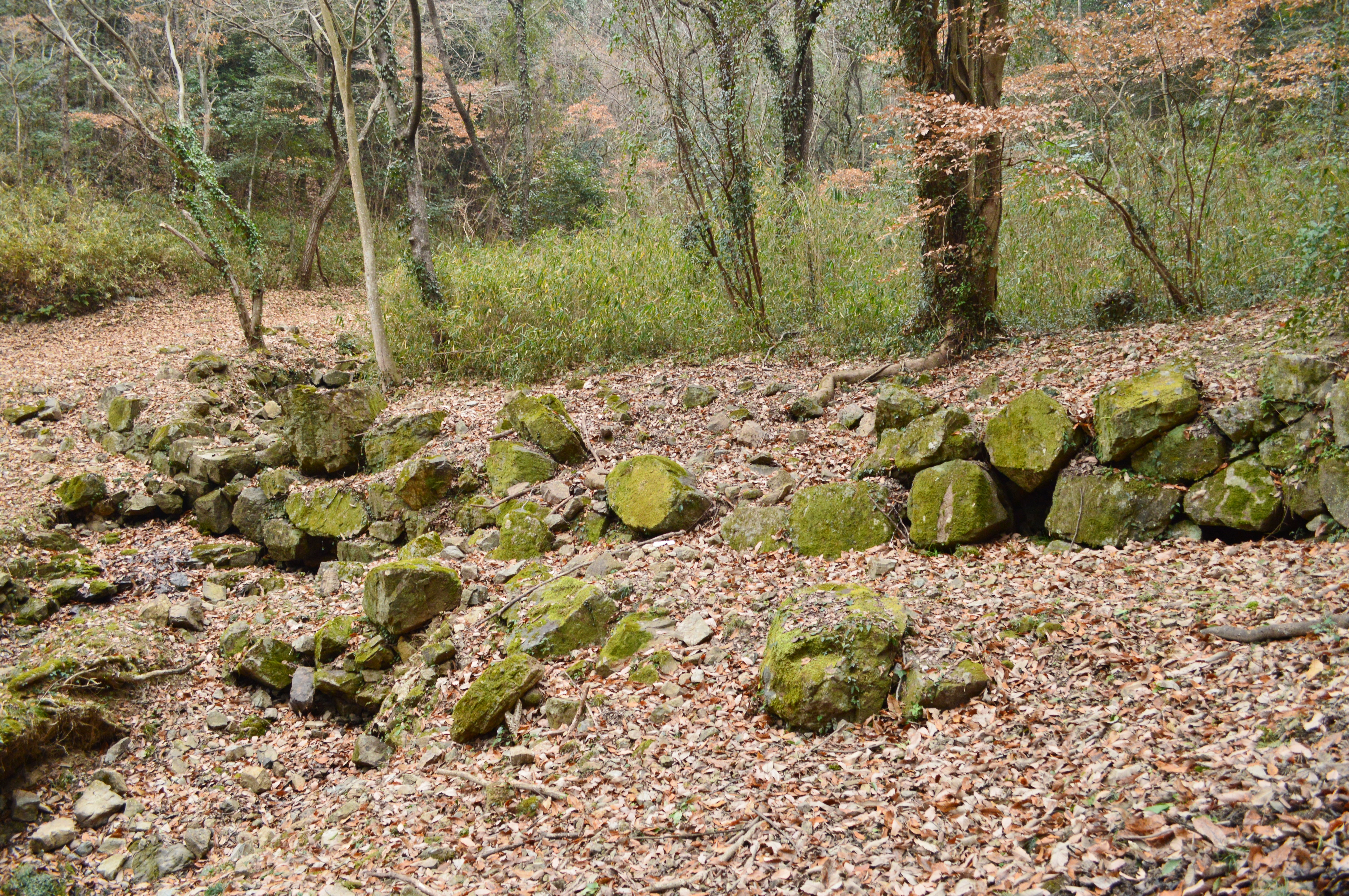 大廻小廻山城跡 一の木戸跡